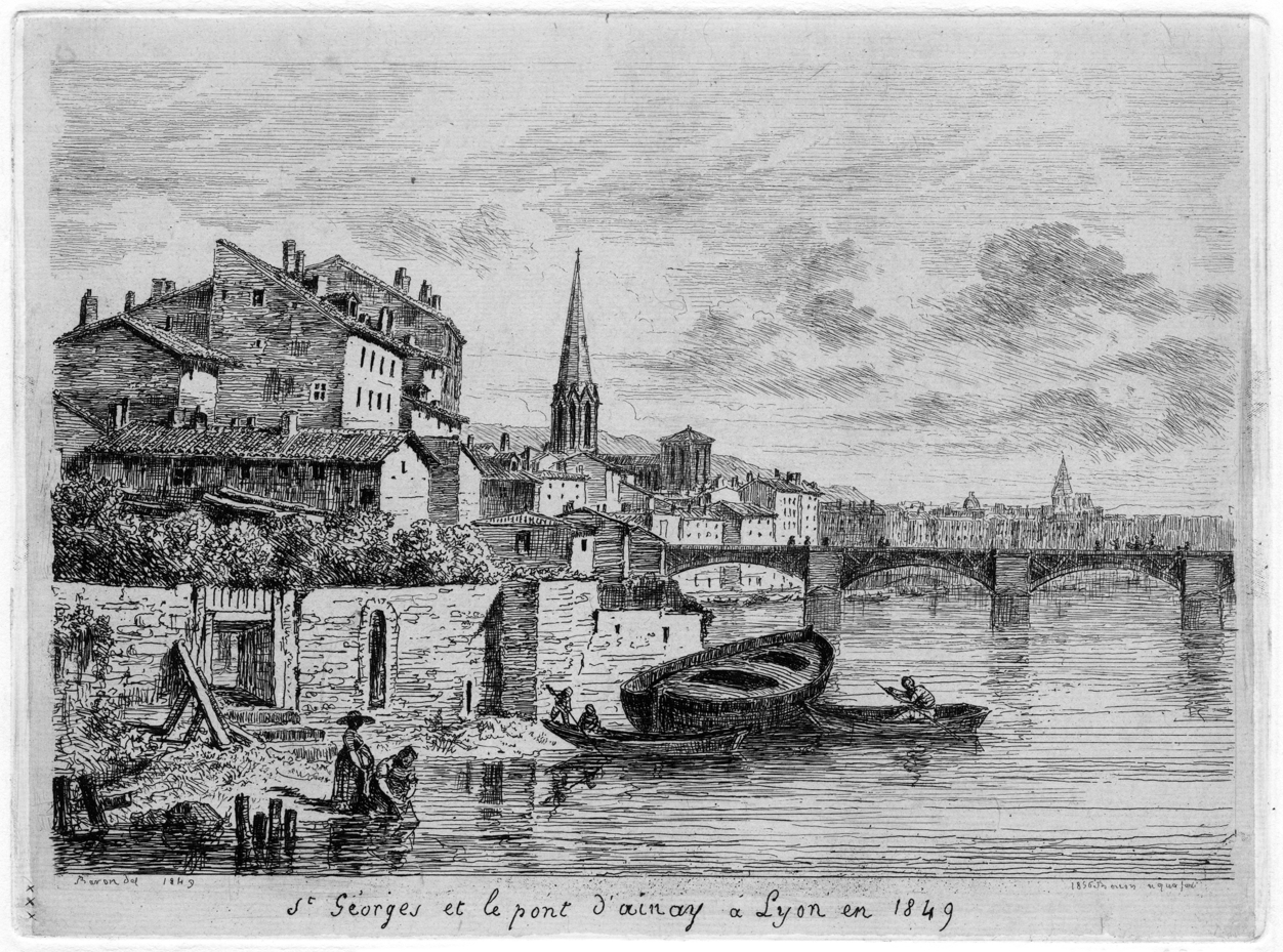 Vue du quartier Saint-Georges à Lyon (5e arrondissement) et du pont d'Ainay en 1849, gravé par Balthazar Jean Baron avec titre sous l'image